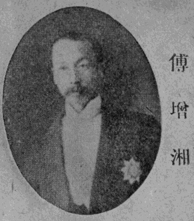 民國名人圖鑑肖像